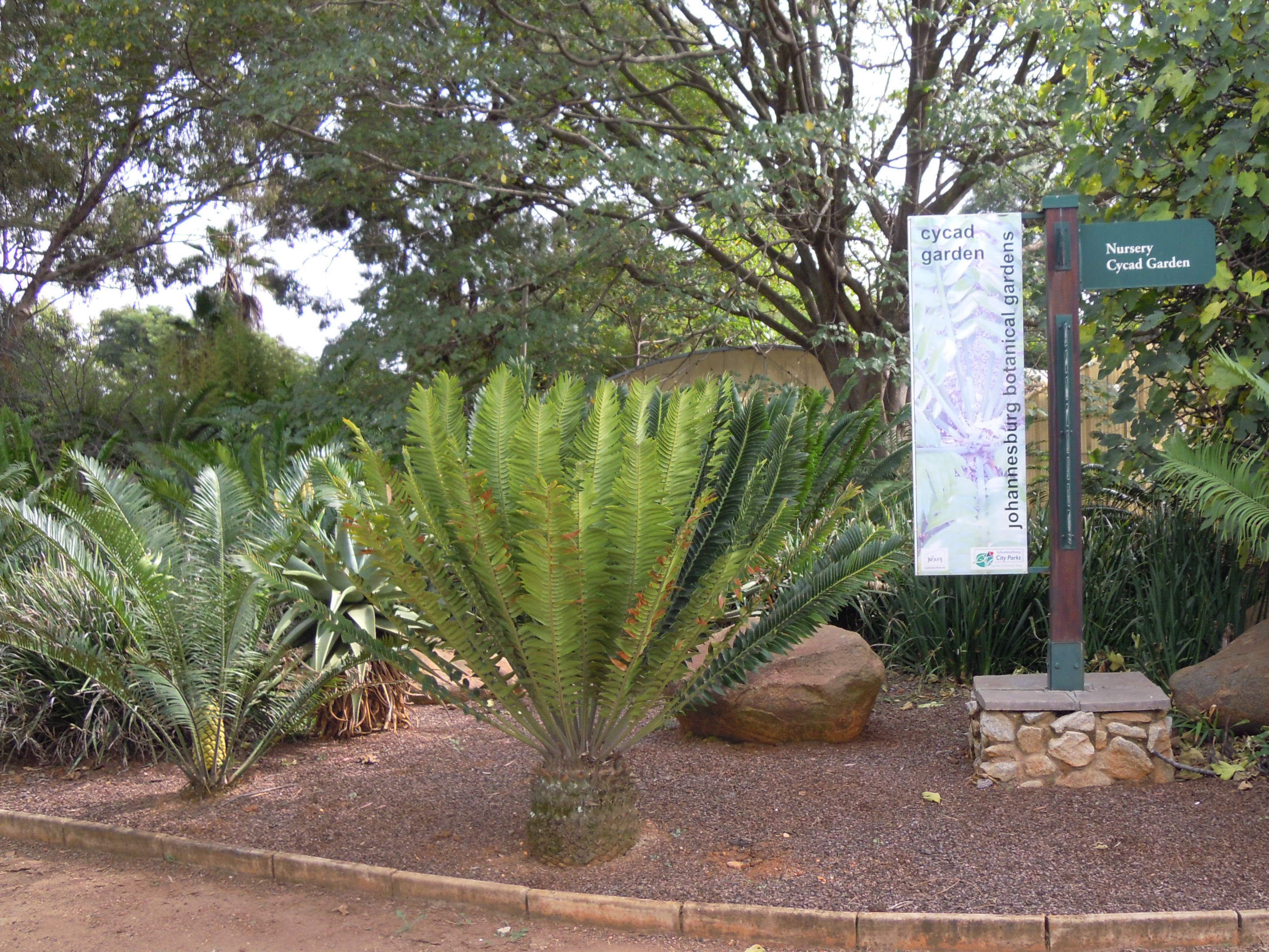 Cycad Garden in the Johannesburg Botanical Gardens